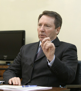 Глава администрации Липецкой области О.П.Королев на встрече с Председателем Правительства Российской Федерации В.В.Путиным